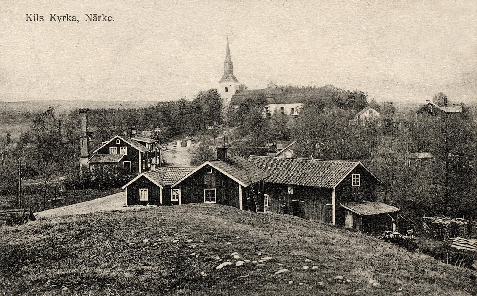 Kil Church, Närke, Sweden around 1910